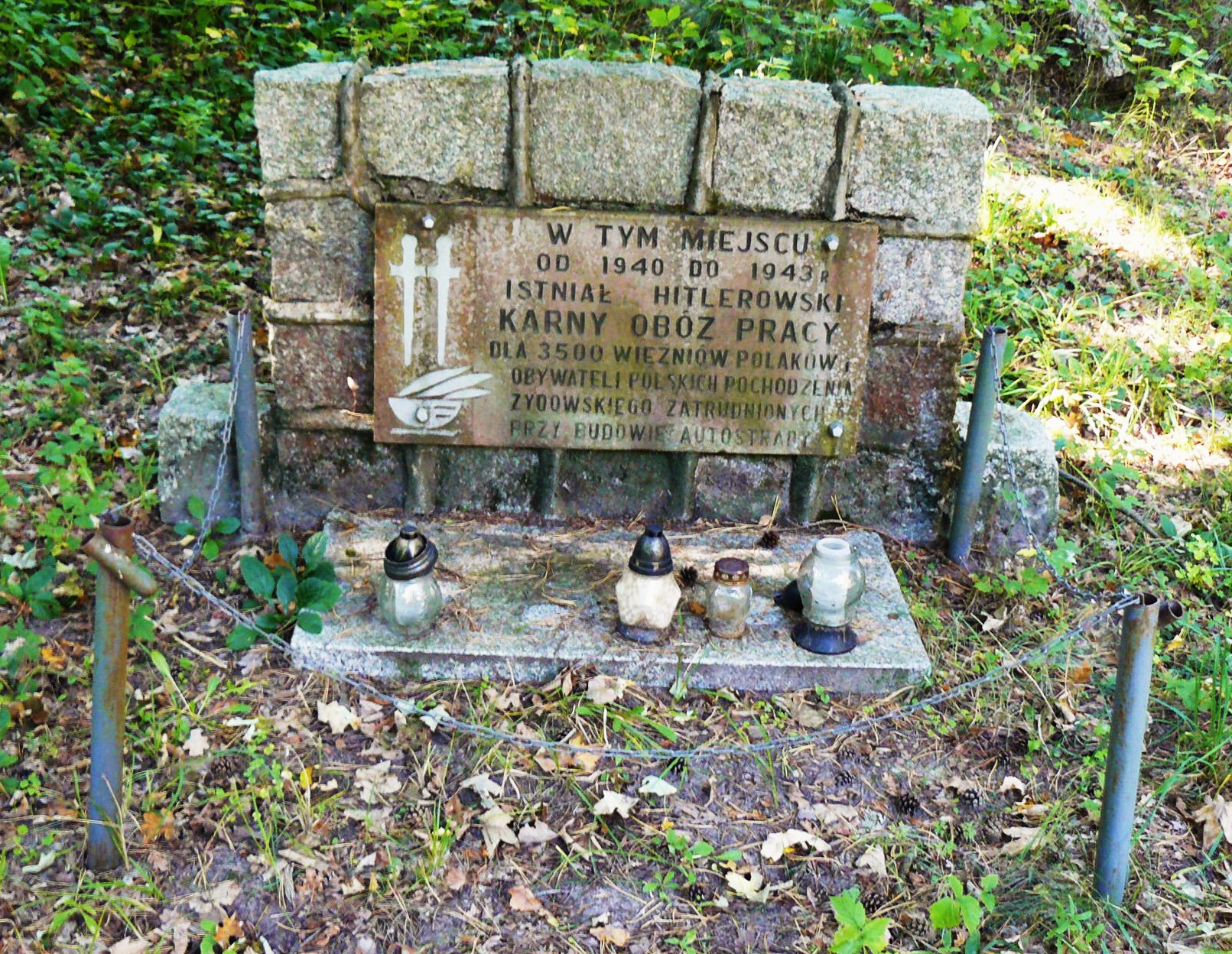 Pomnik w miejscu dawnego nazistowskiego niemieckiego obozu pracy w Przyłęku-Bobrówce.